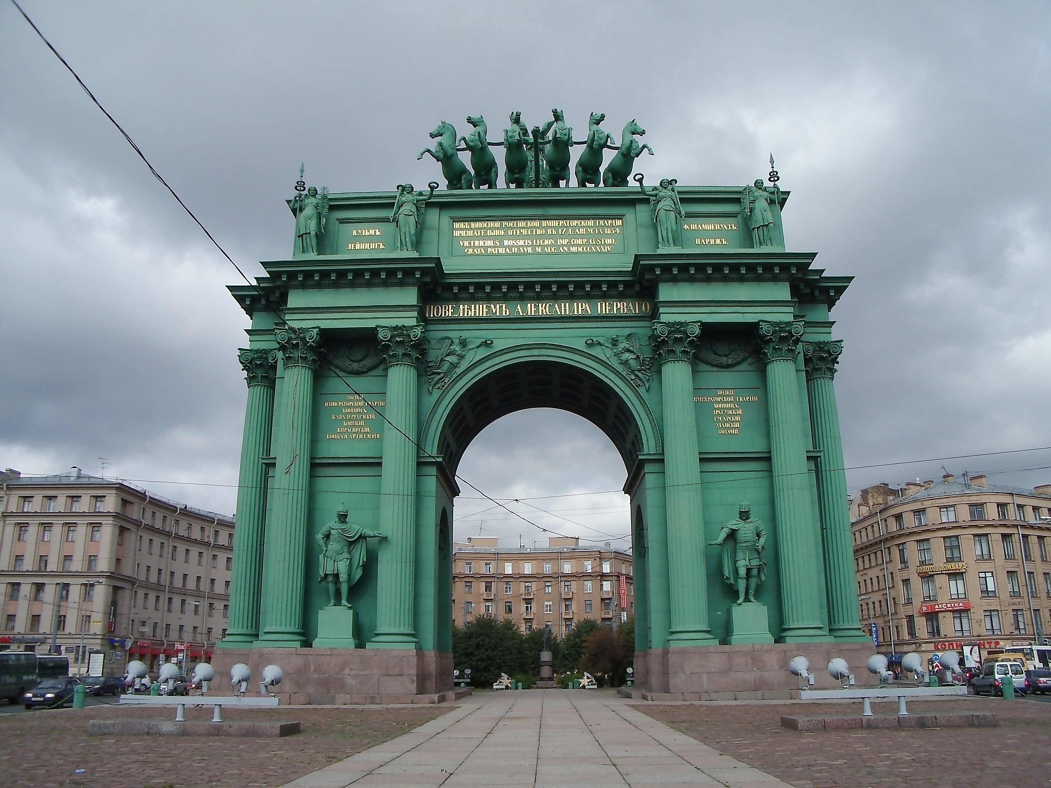 Нарвские триумфальные ворота